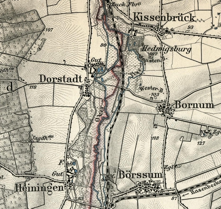 Karte des Deutschen Reichs 1:100.000 Blatt 312 Wolfenbüttel (Ausschnitt druch den Benutzer)